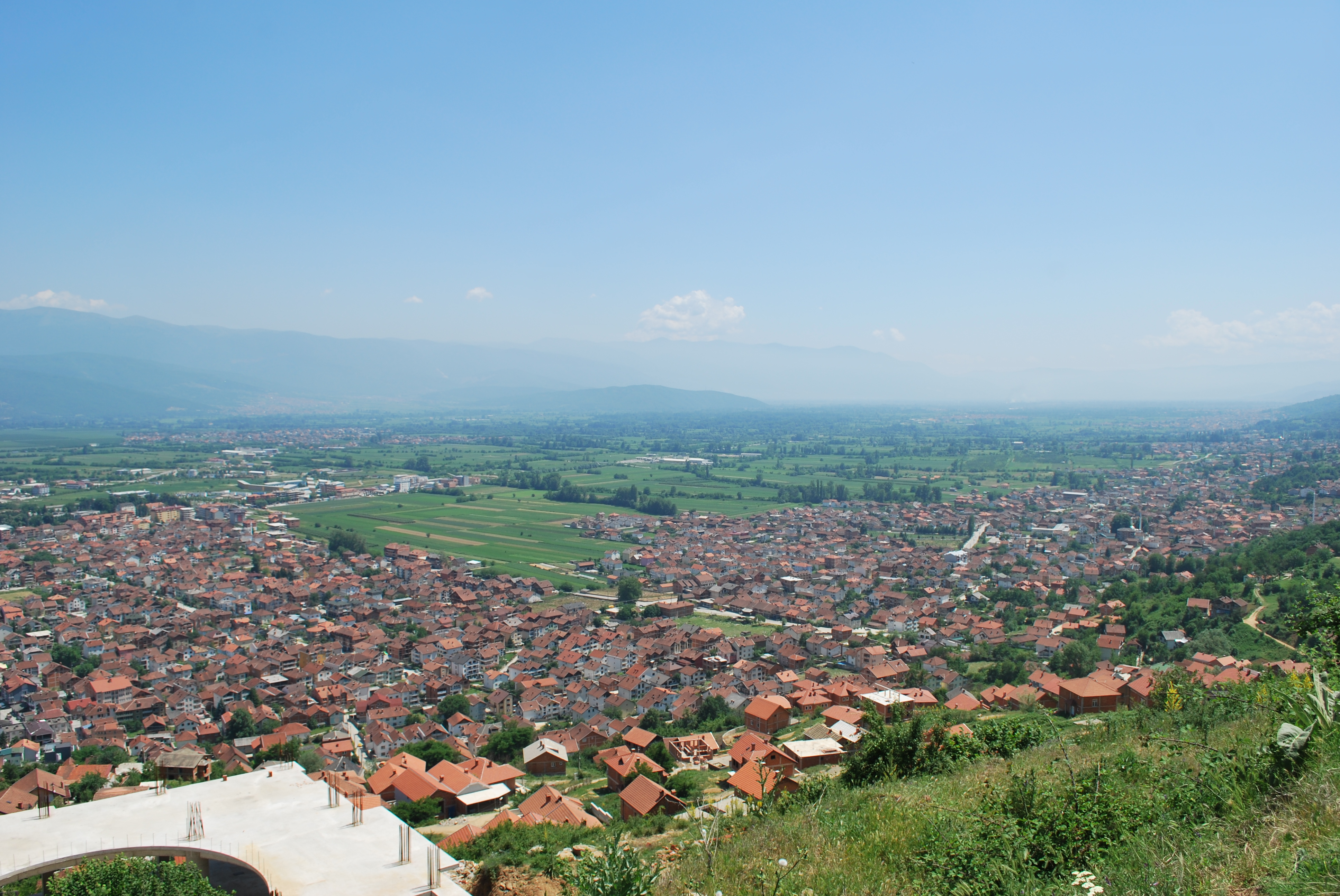 Mala and Golema Rečica near Tetovo, Macedonia